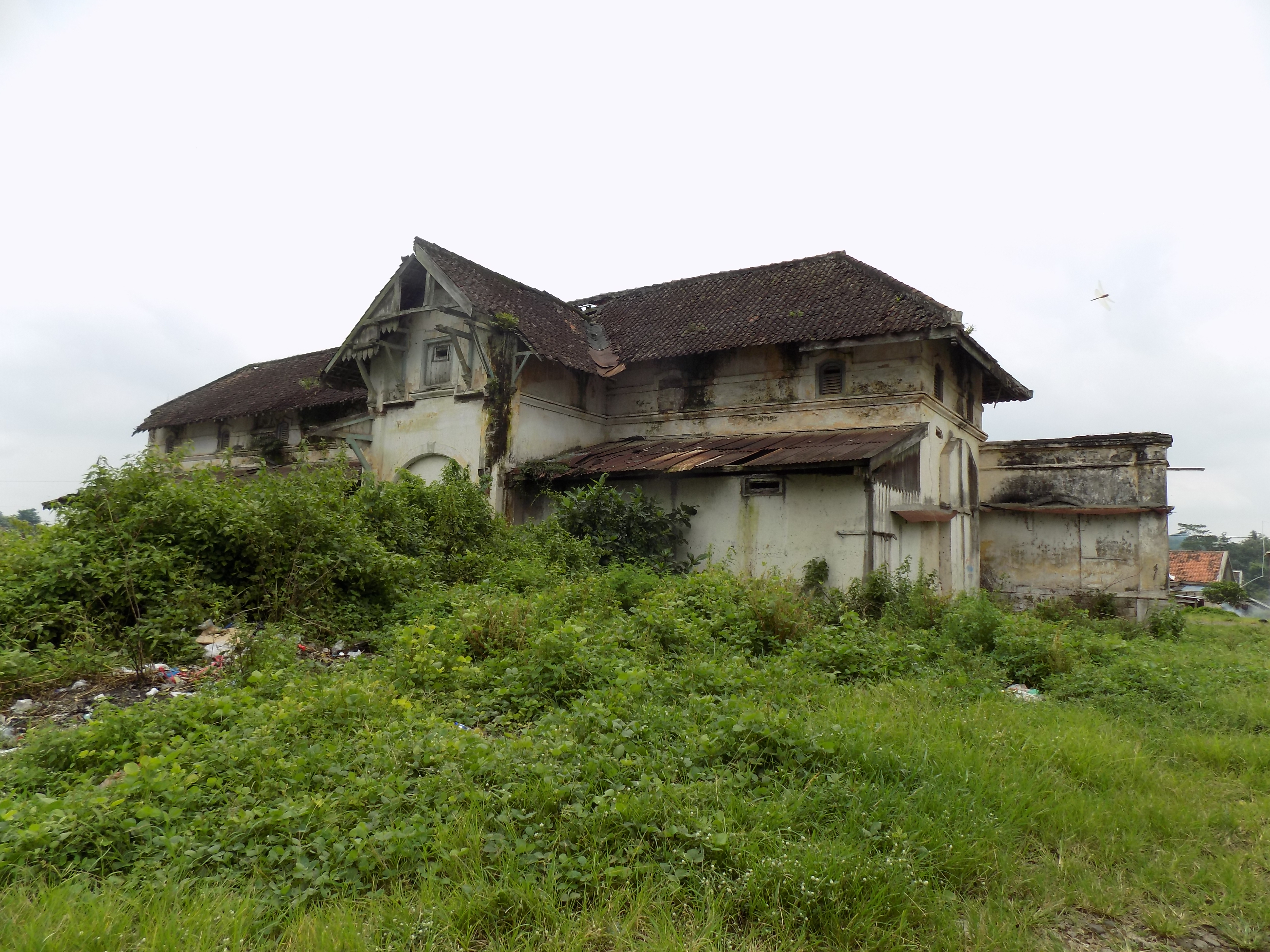 Stasiun Bringin, tampak depan